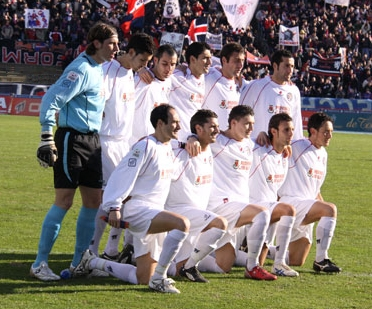 Unione Sportiva Vibonese Calcio 2008/2009